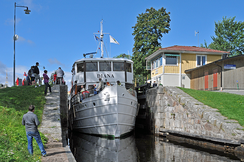 MS Diana slussar vid Forsvik på Göta kanal 2012